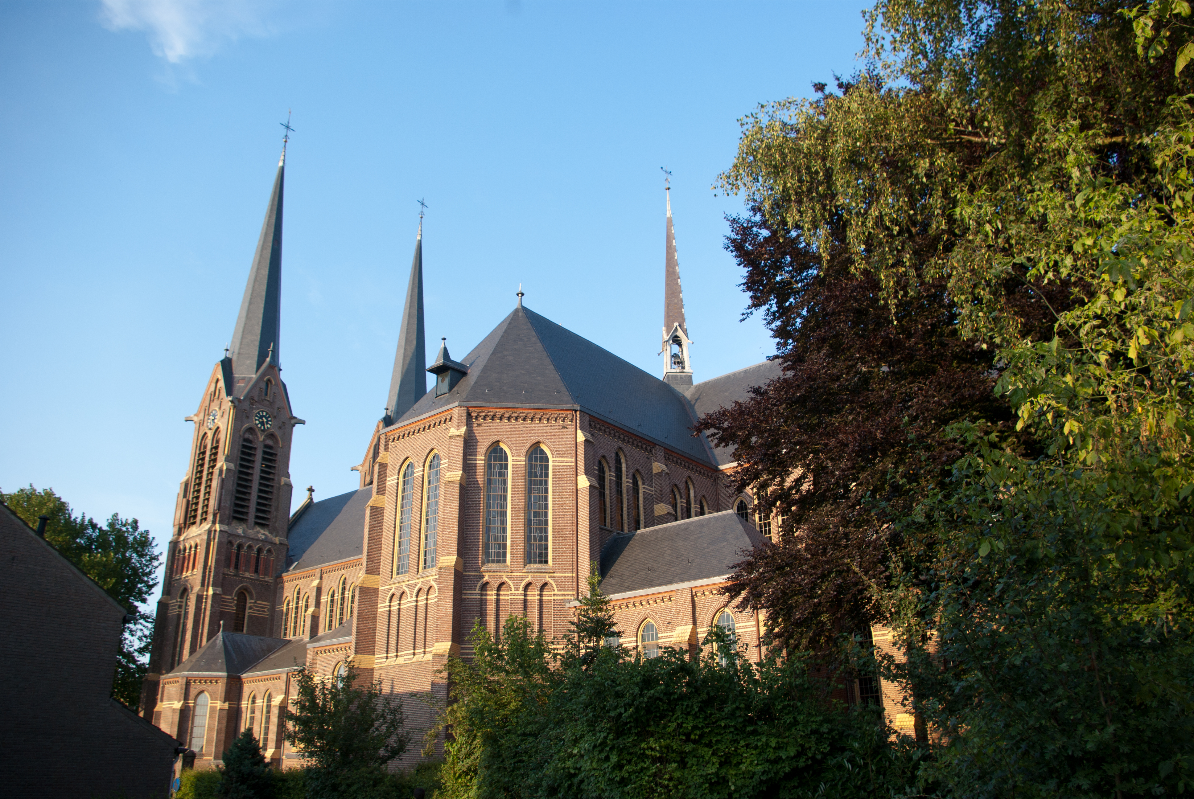 Zicht op een deel van de Johannes de Doperkerk in de Hoofdstraat in Kaatsheuvel